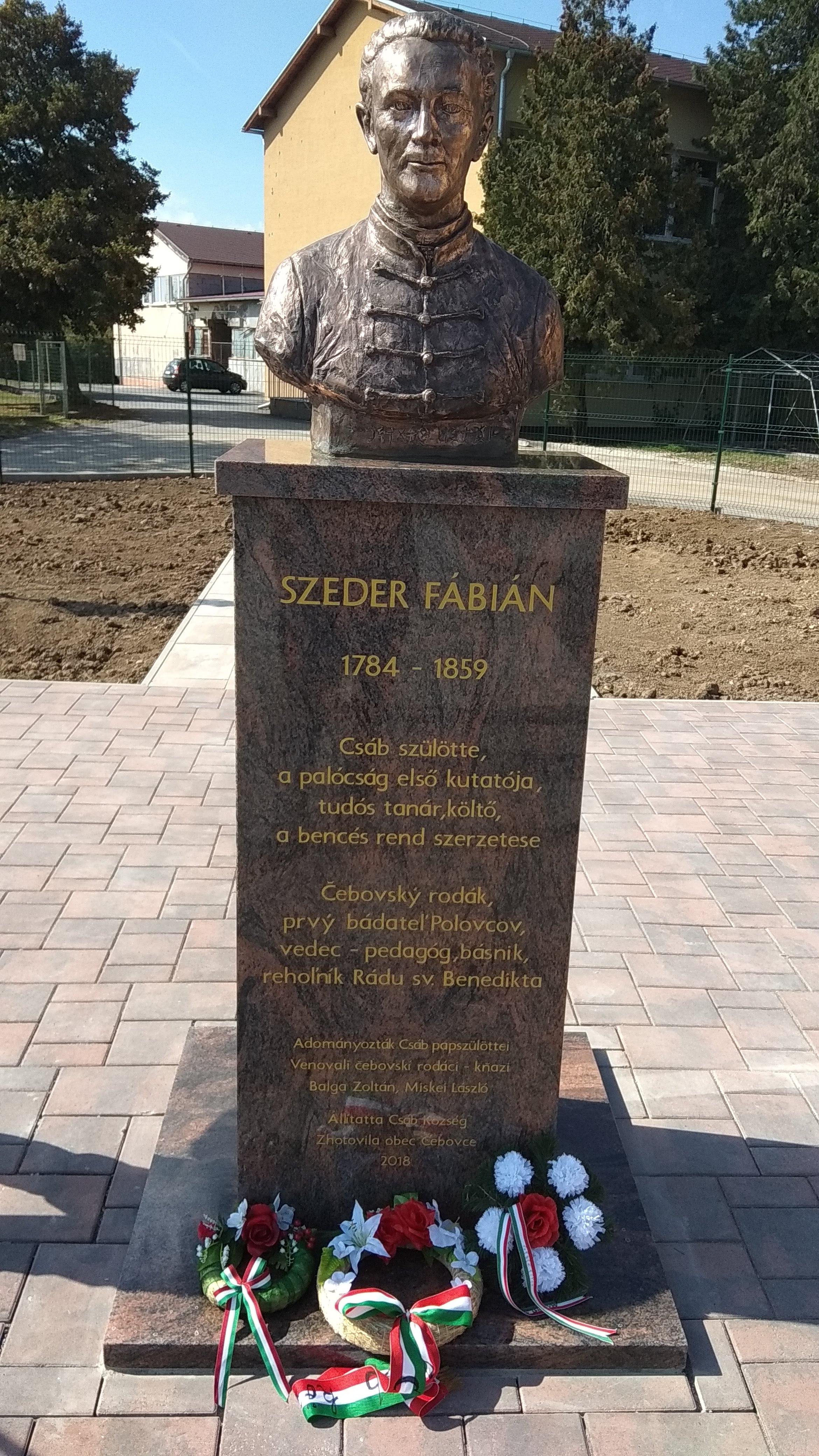 A tiszteletére állíttatott büszt szülőfalujában, Csábon